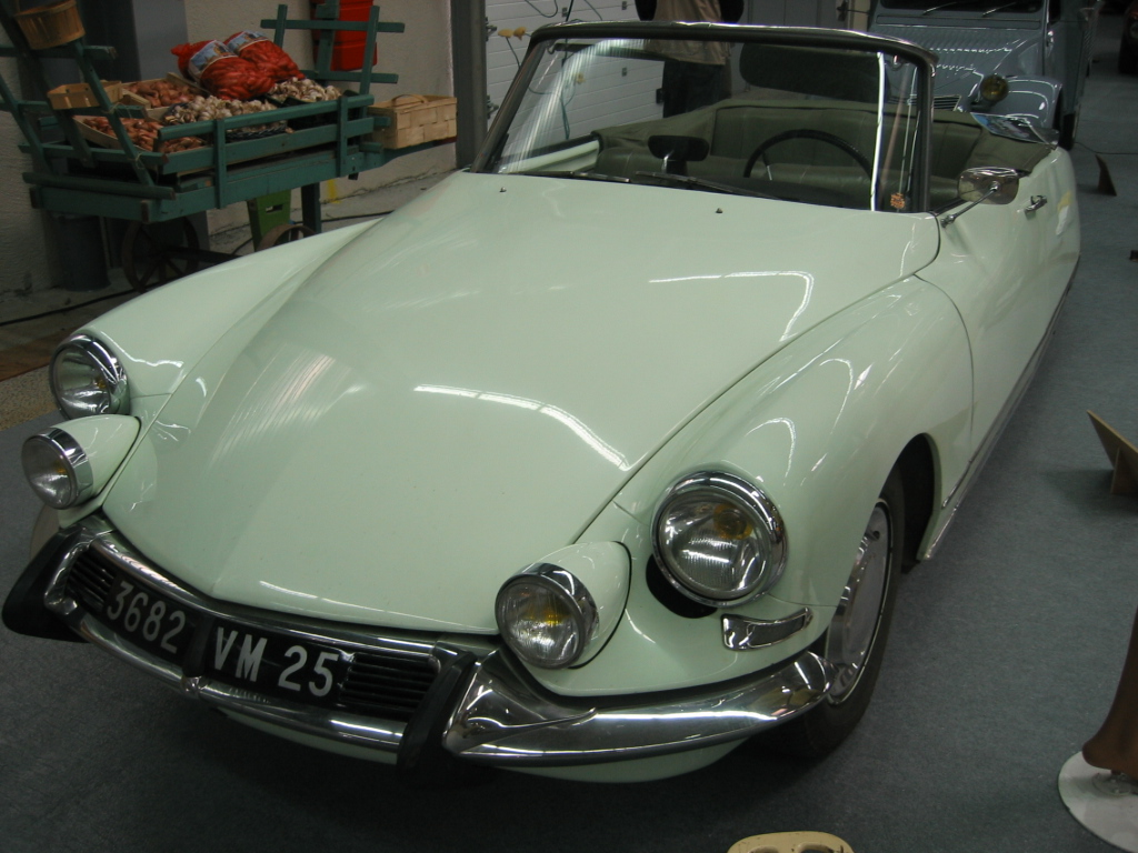 Citroen DS cabriolet